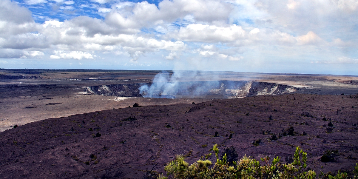 Иллюстрация для викиучебника Гавайеведение